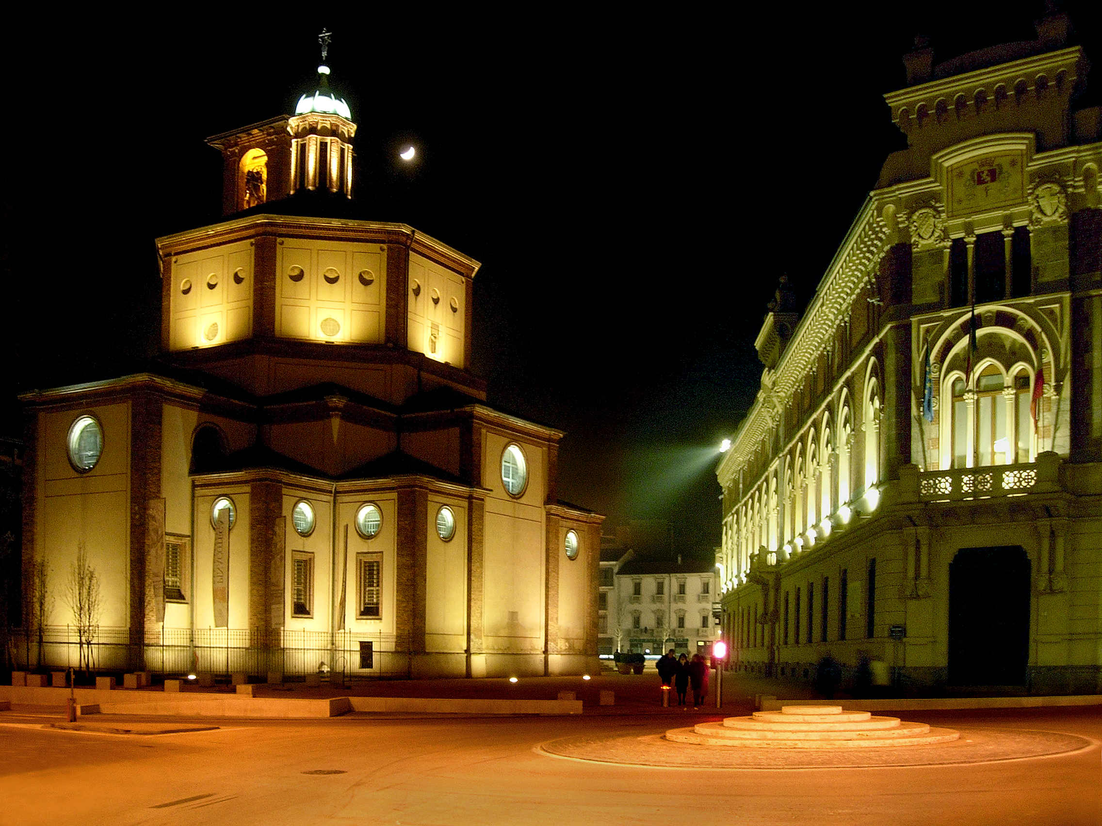 Palazzo Malinverni This is a photo of a monument which is part of cultural heritage of Italy.